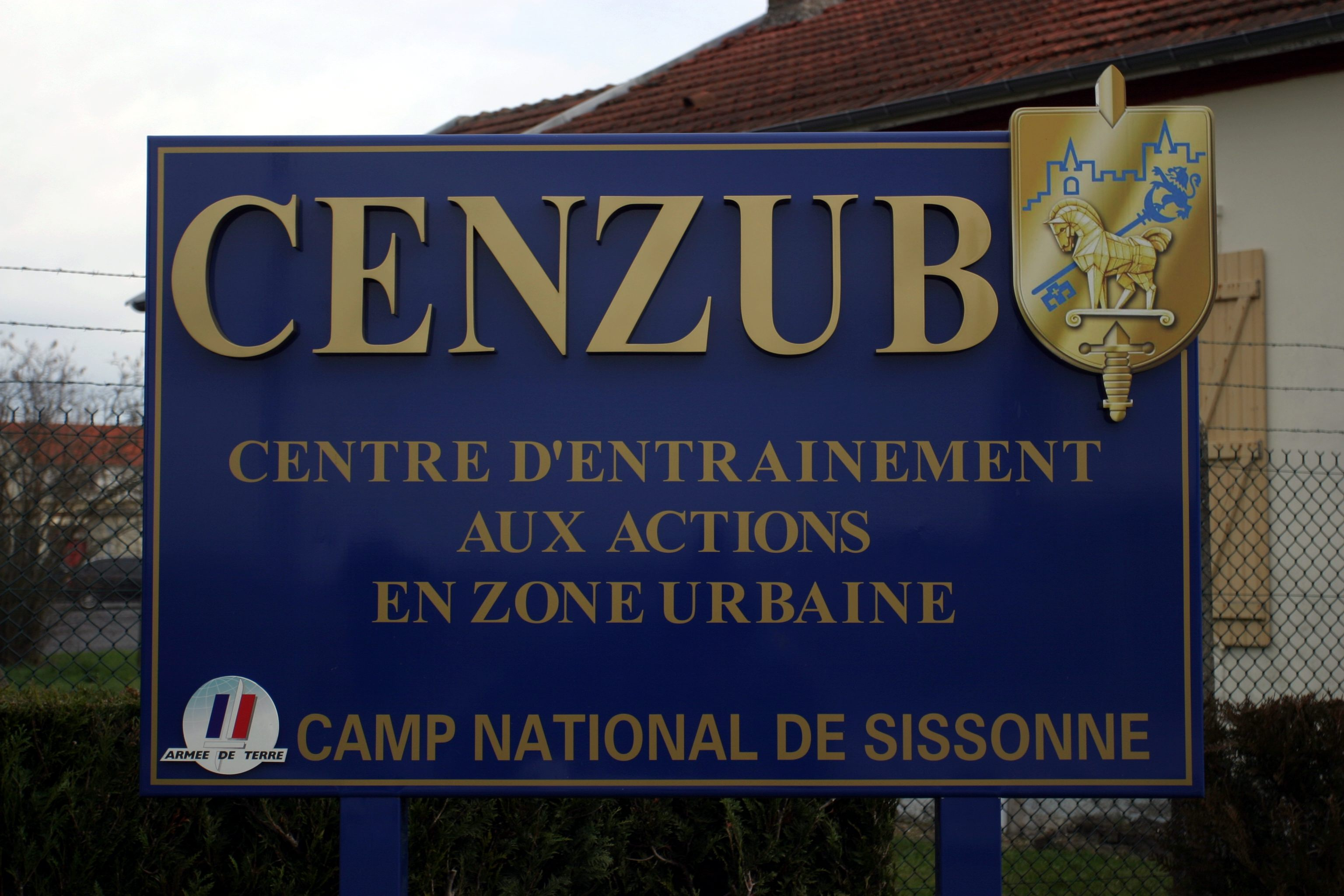 Photo du panneau marquant l'entrée du Centre d'entraînement au combat en zone urbaine de Sissonne en France